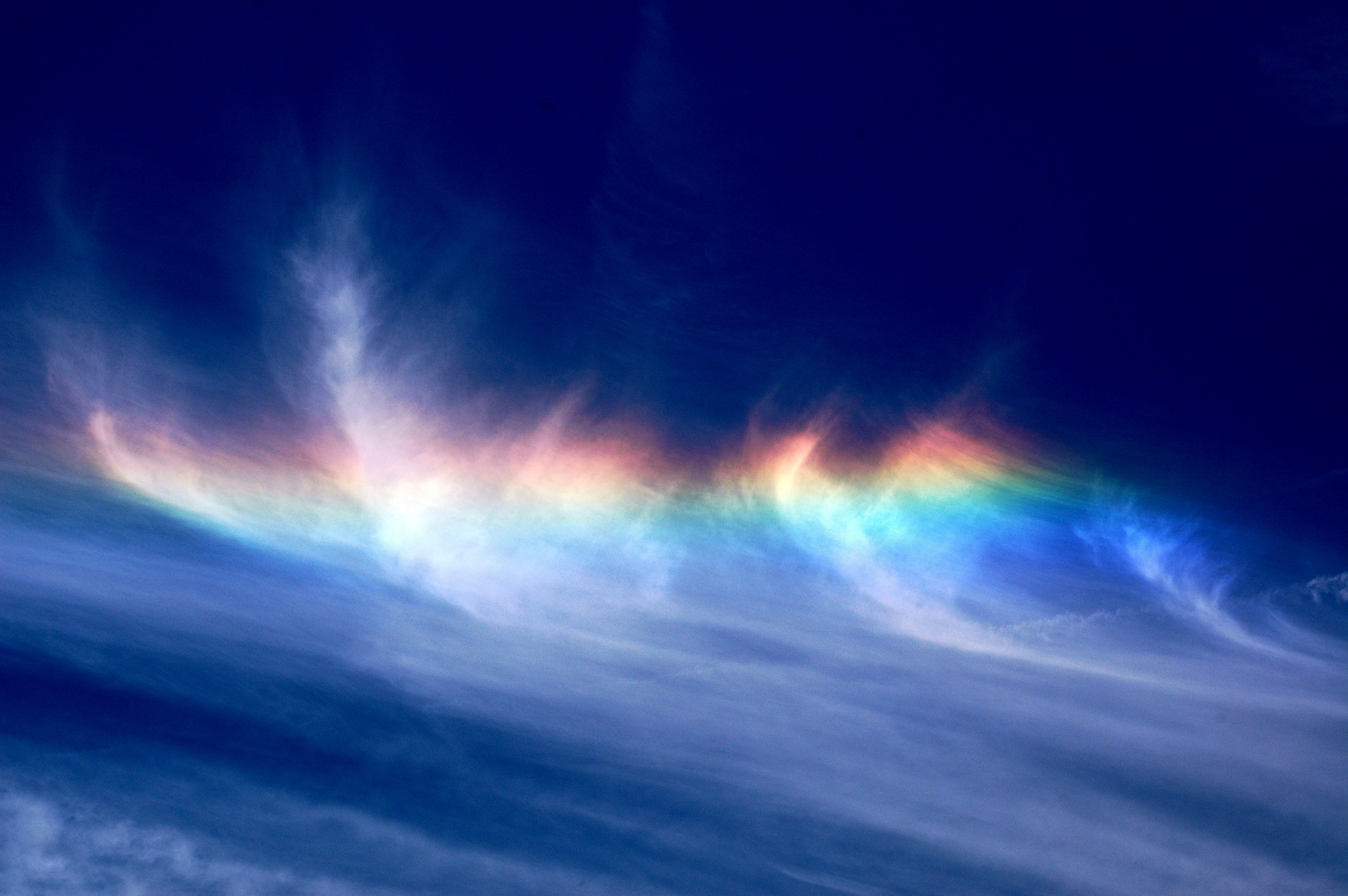 Circumhorizontal arc.